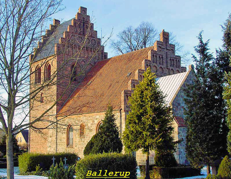 fra sydøst